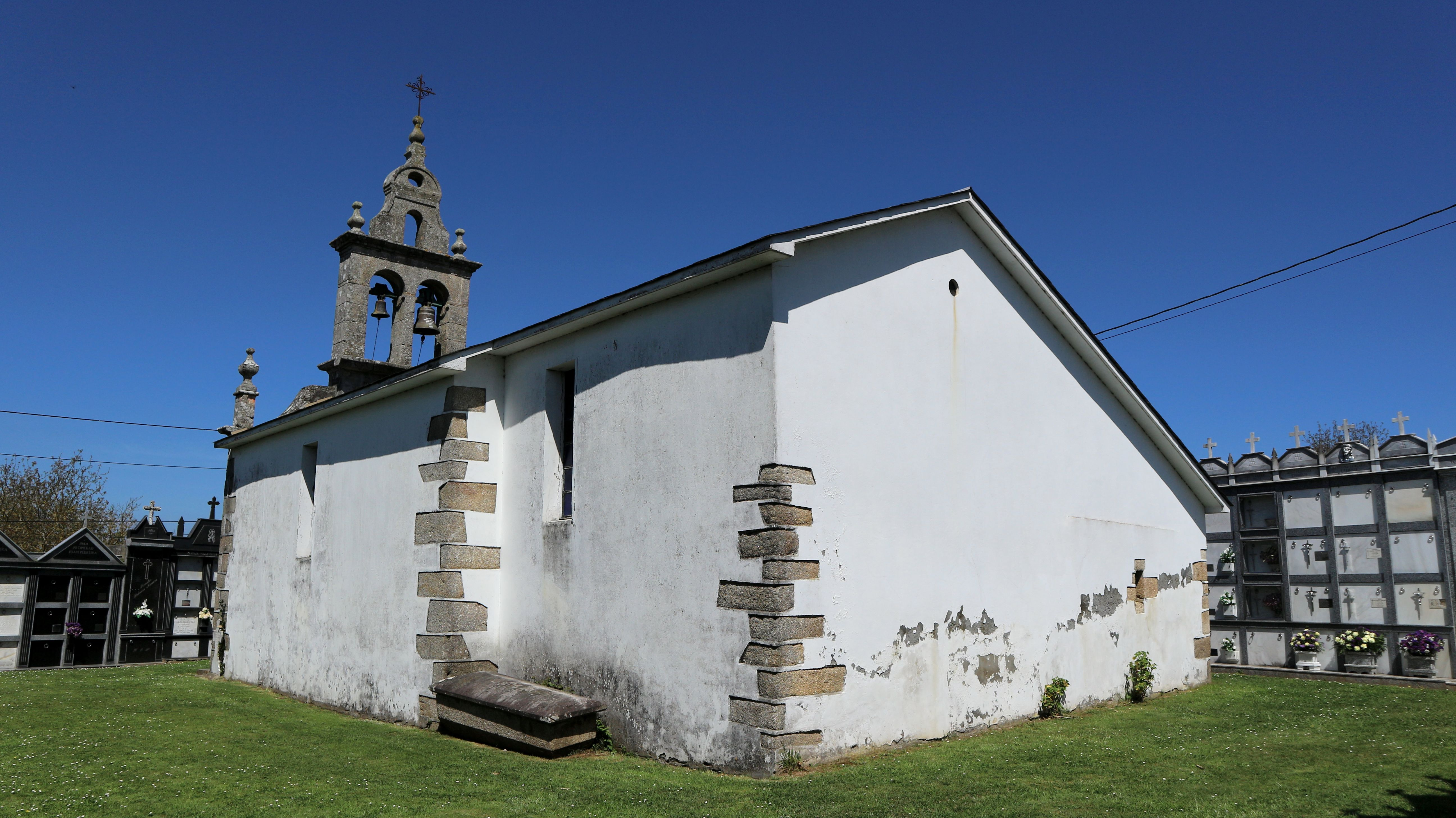 Igrexa de San Vicenzo de Carres. Carres, Oza-Cesuras.